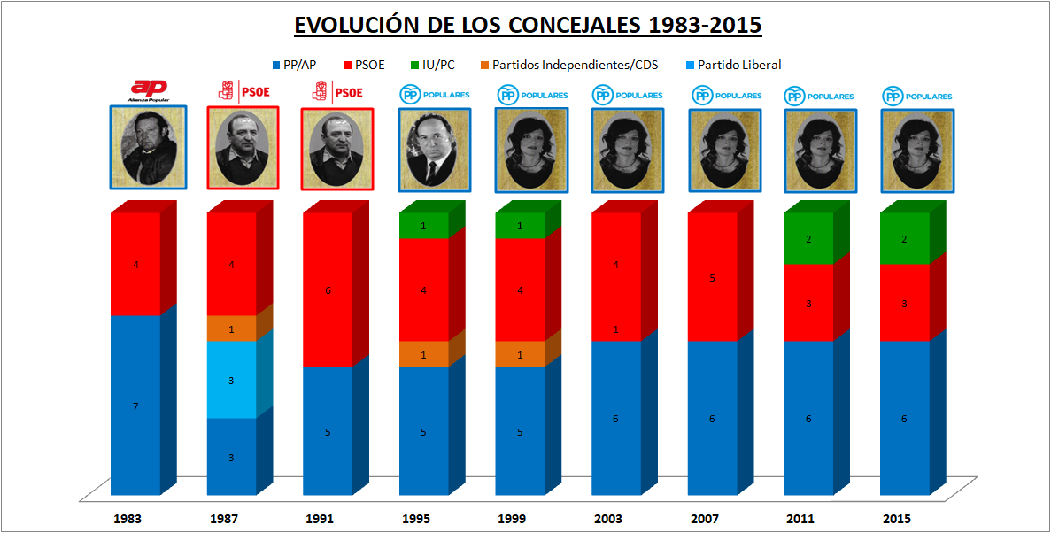 Evolución del número de concejales en las legislaturas 1983-2015